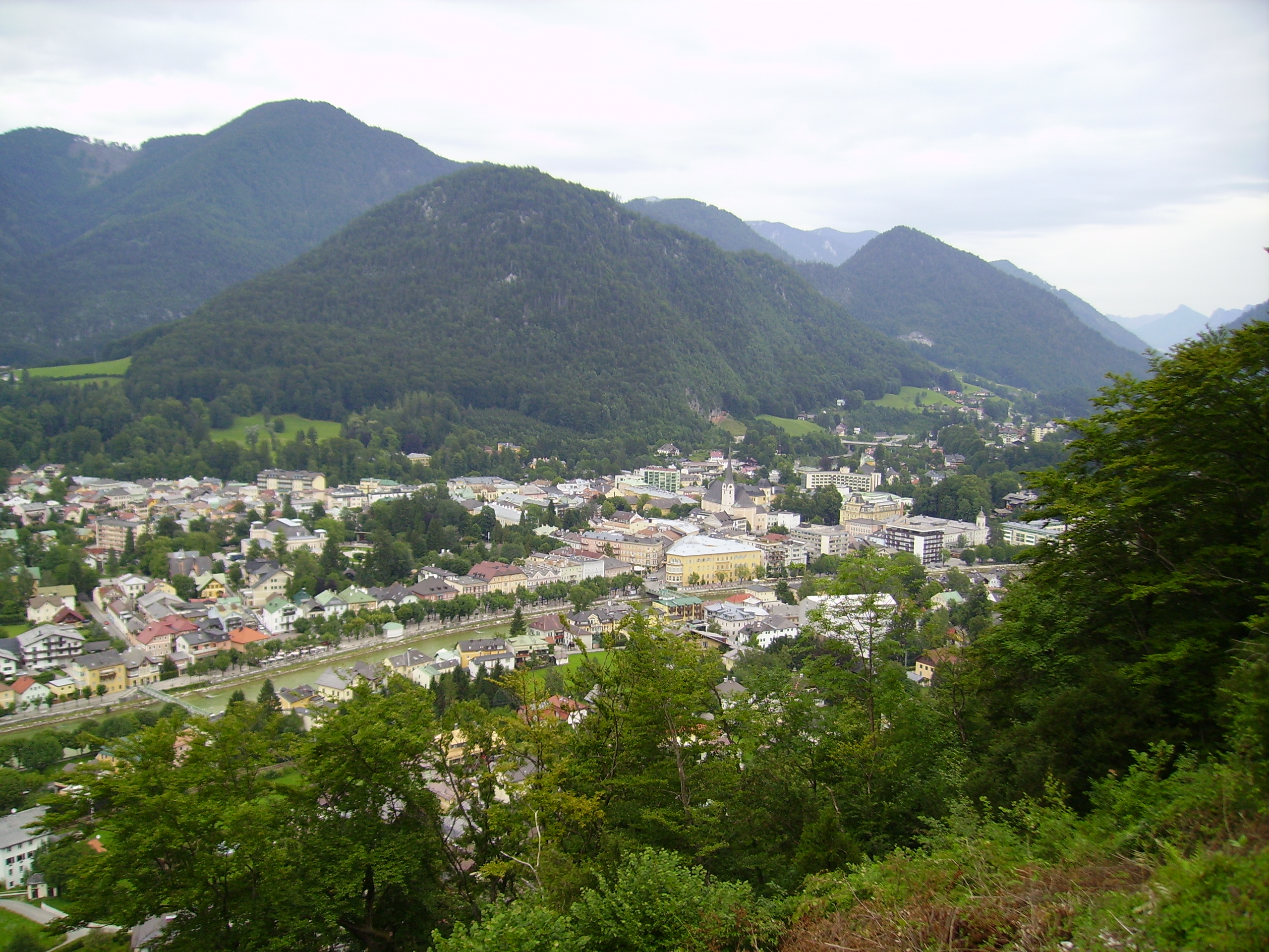 Bad Ischl vom Siriuskogl aus gesehen.